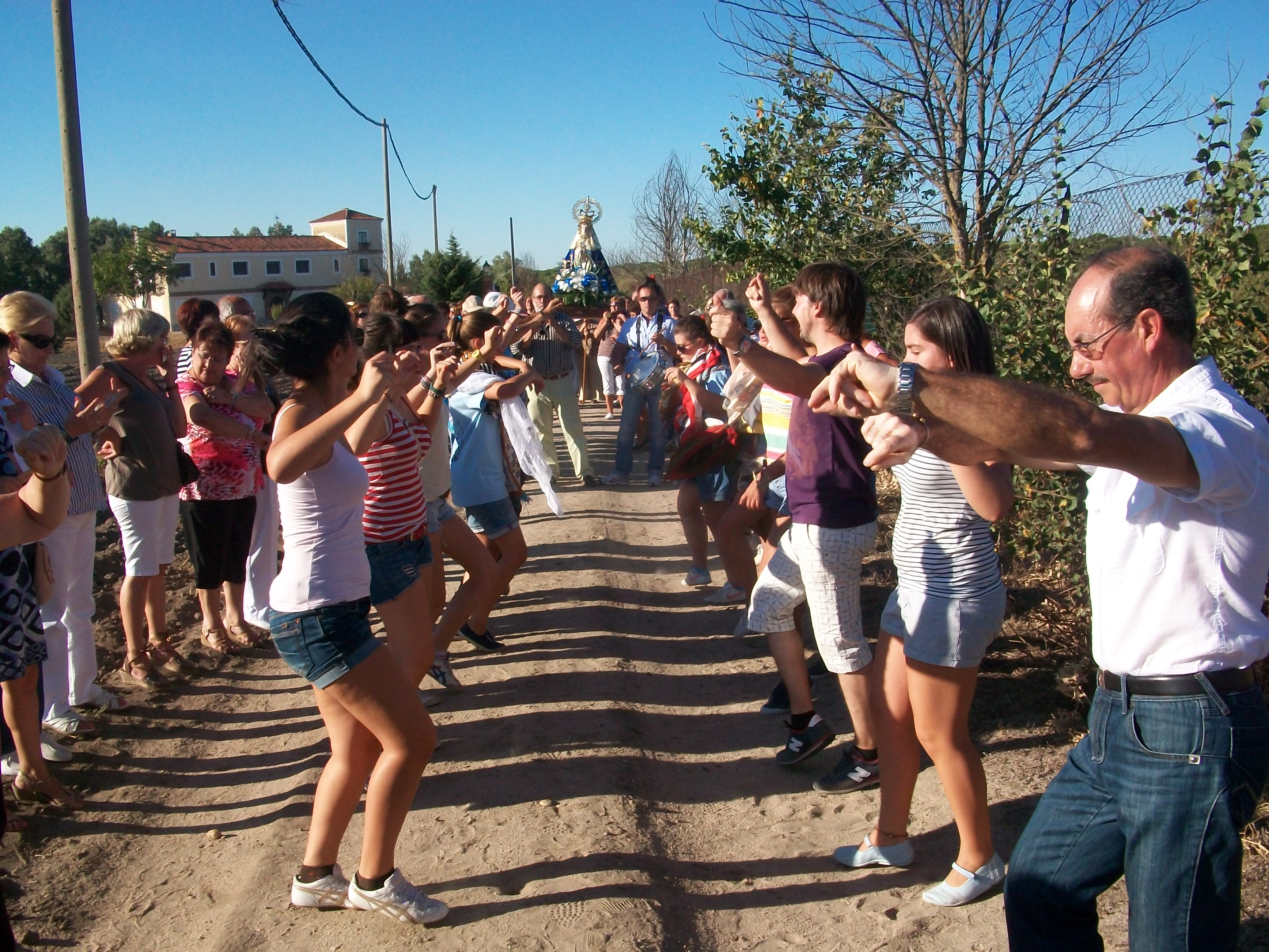 Gente de Matapozuelos bailando jotas en la procesión de la Virgen de SieteIglesias.